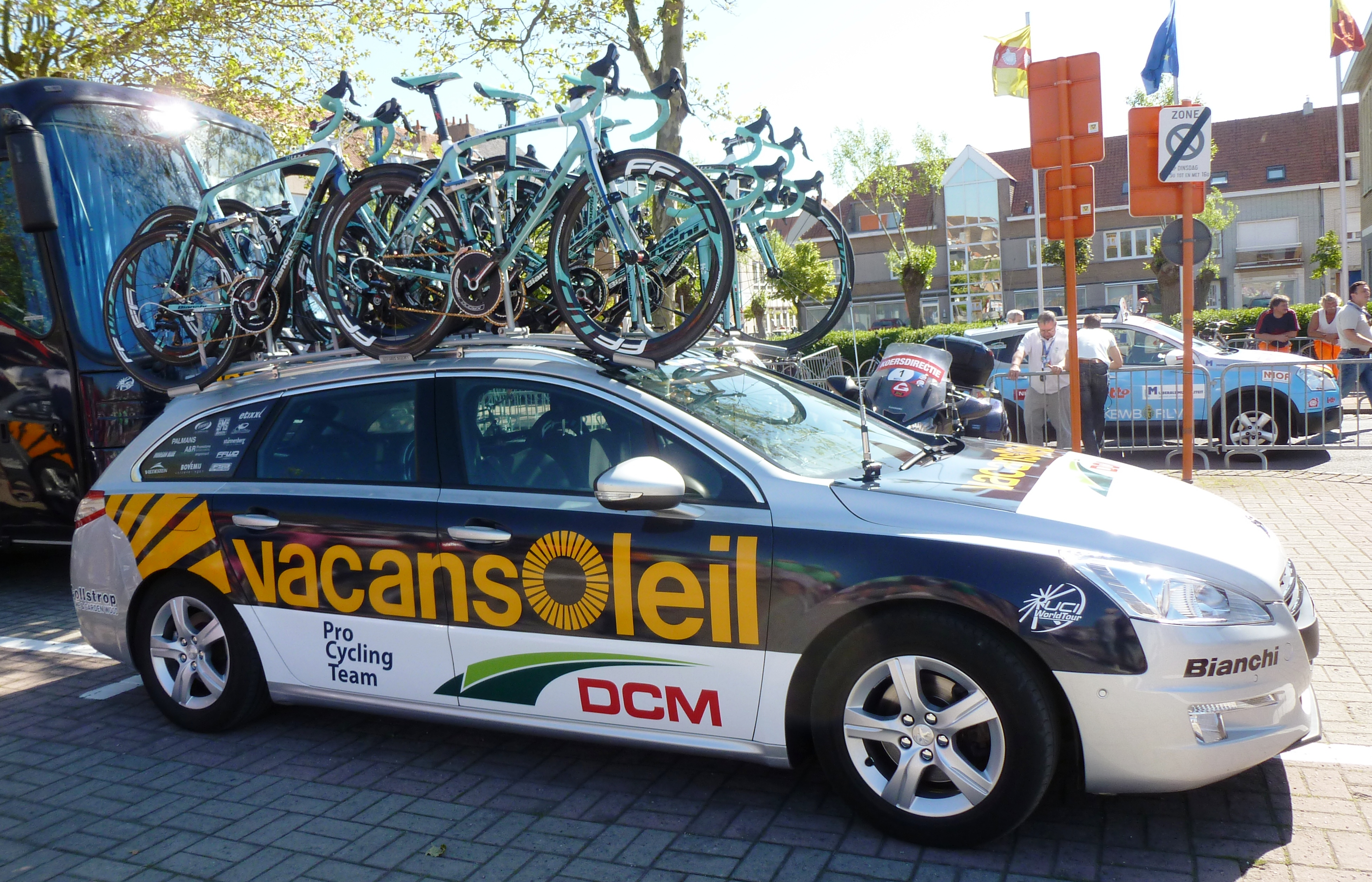 Begleitfahrzeug des Radsportteams Vacansoleil 2012